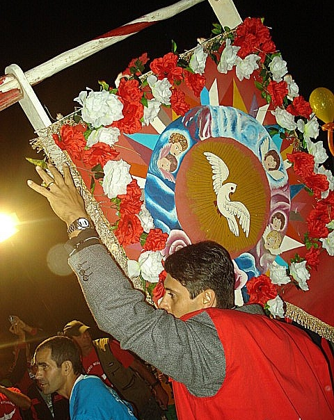 Levantamento do Mastro na 190º Festa do Divino de Pirenópolis.